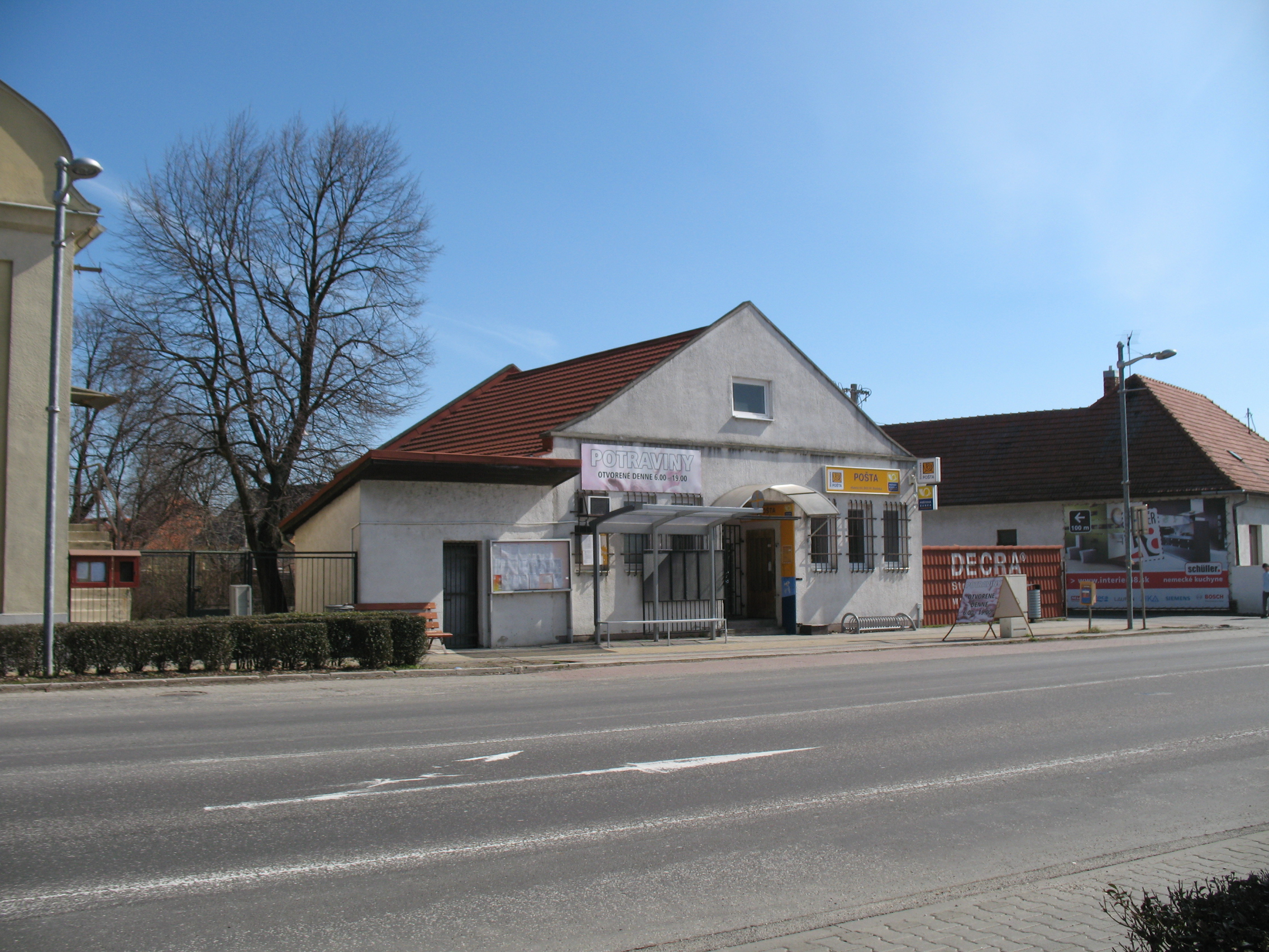 Csölle